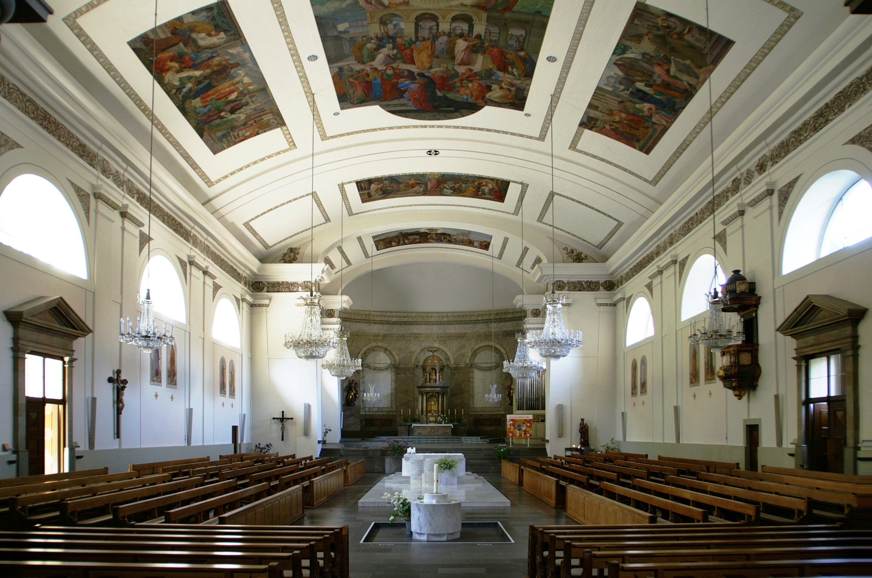 Stadpfarrkirche St.Martin in Dornbirn